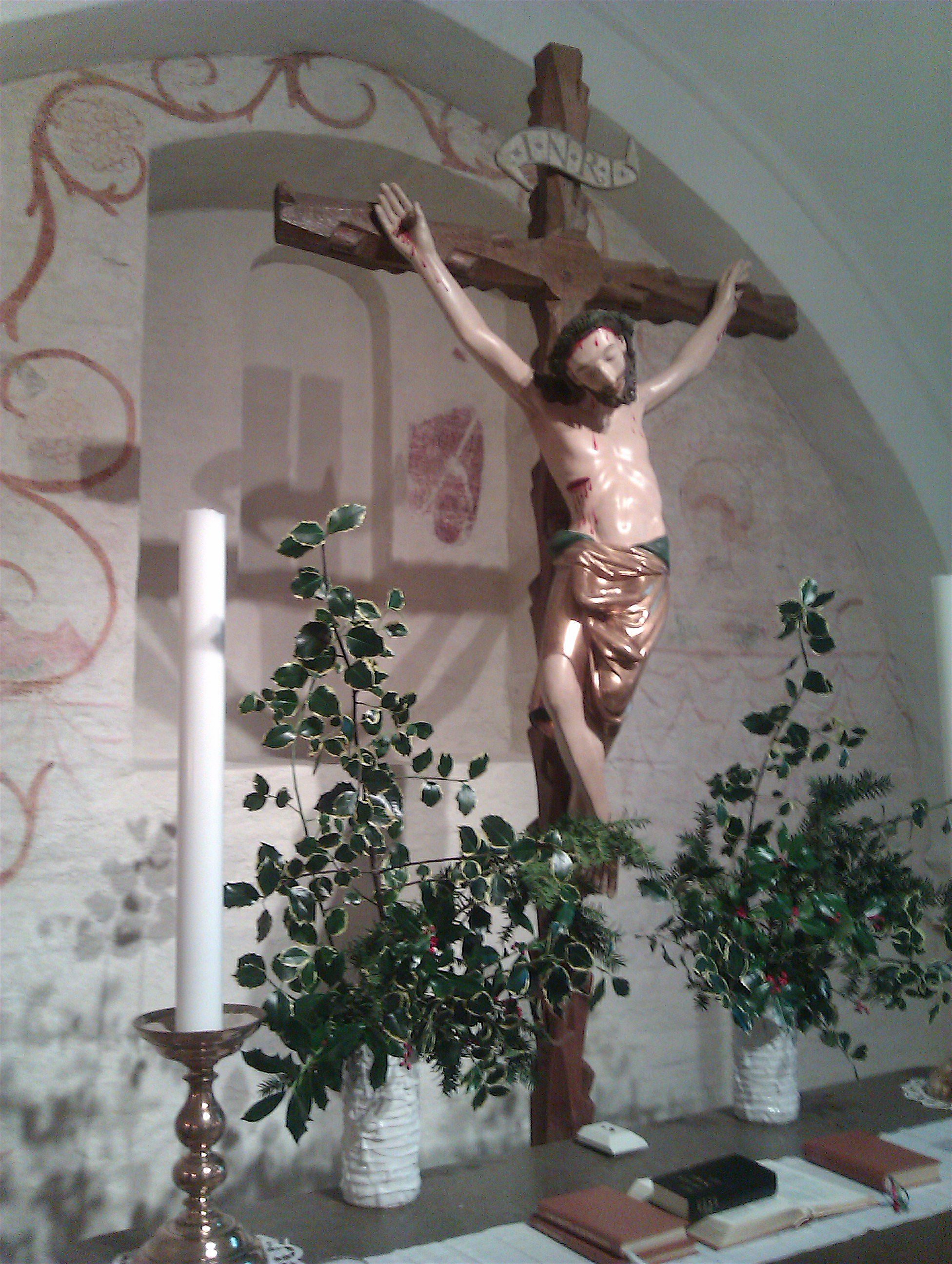 Krucifiks fra det 14. århundrede, Torup Kirke, Halsnæs, Nordsjælland